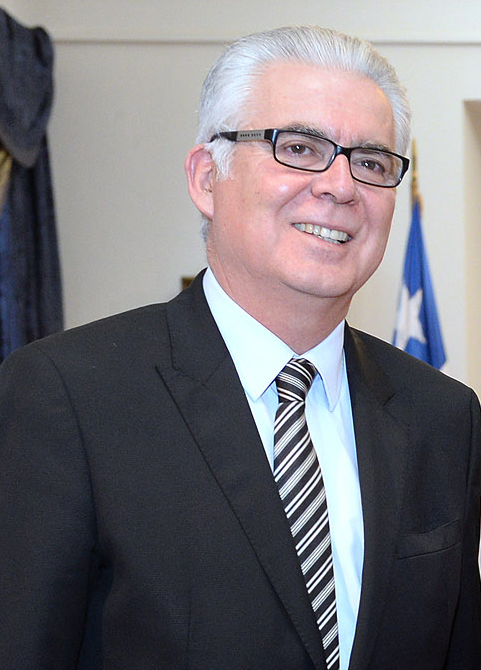 Marcos Vásquez Meza, policía chileno.